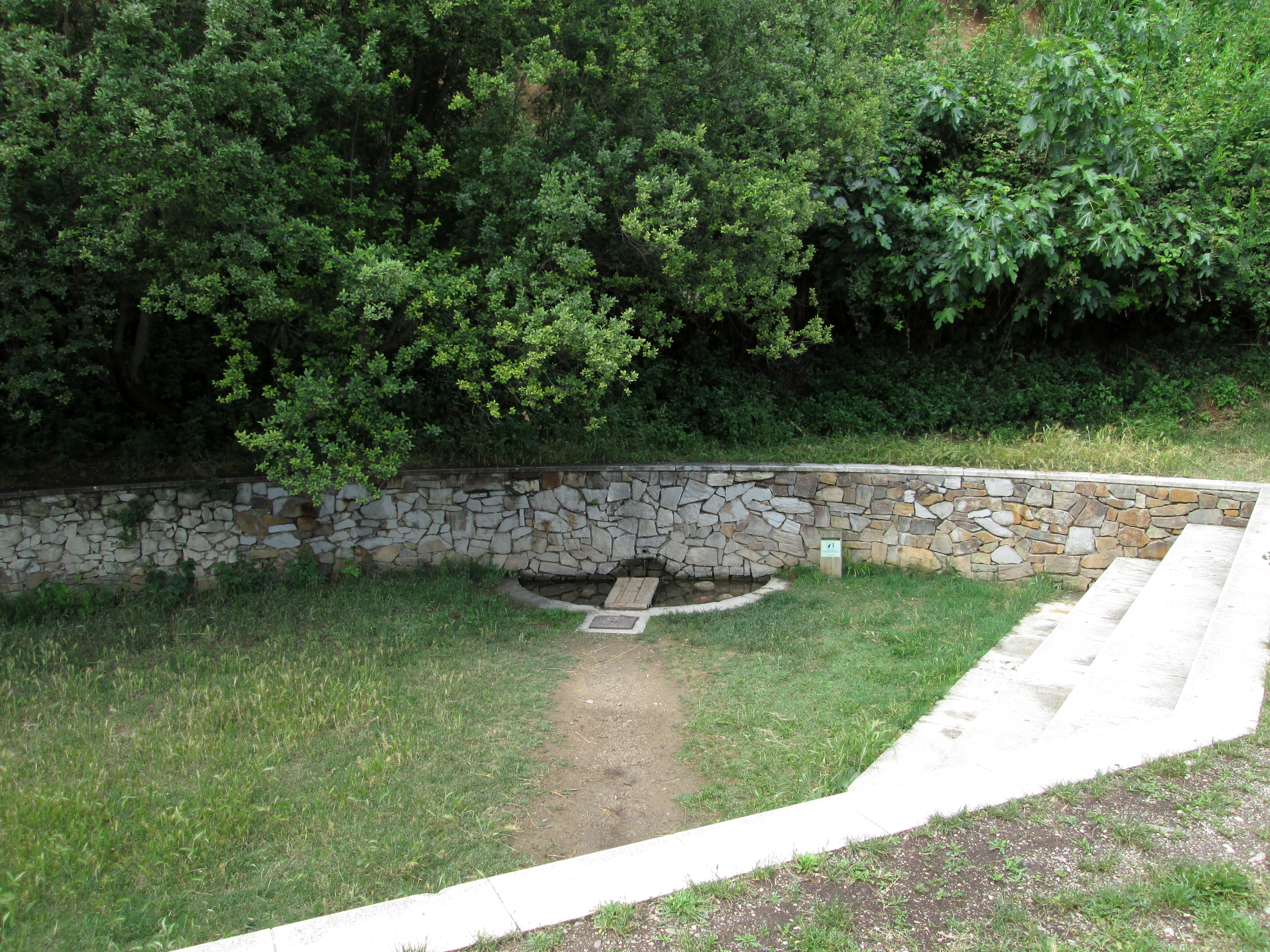 Fuente dels Degotalls. Fuente natural situada en el margen izquierdo del río ripoll, en Sabadell, Barcelona (España).